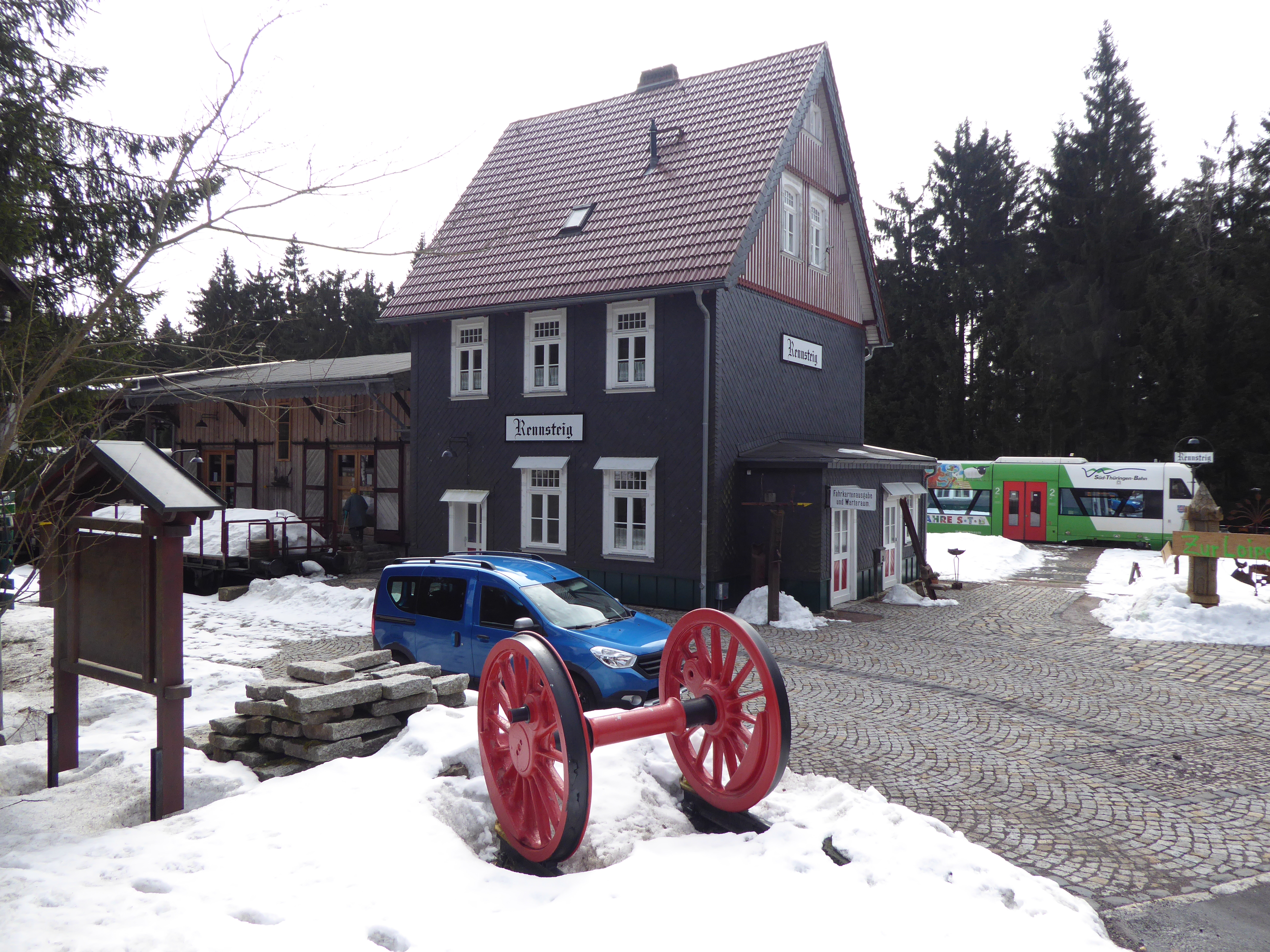 Bahnhof Rennsteig mit Rennsteigshuttle, Blick vom Bahnhofsvorplatz